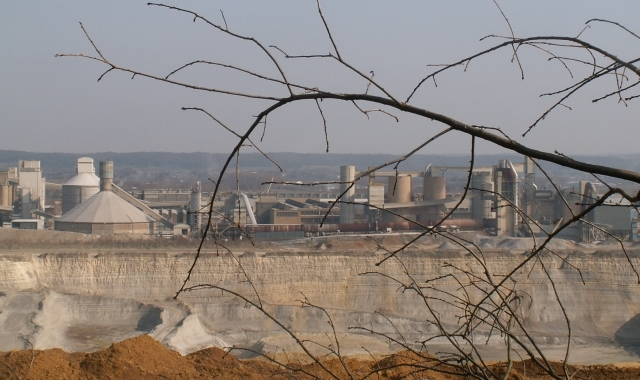 ENCI in Maastricht, bezien vanaf het Encibos op de St. Pietersberg. Eigen foto.